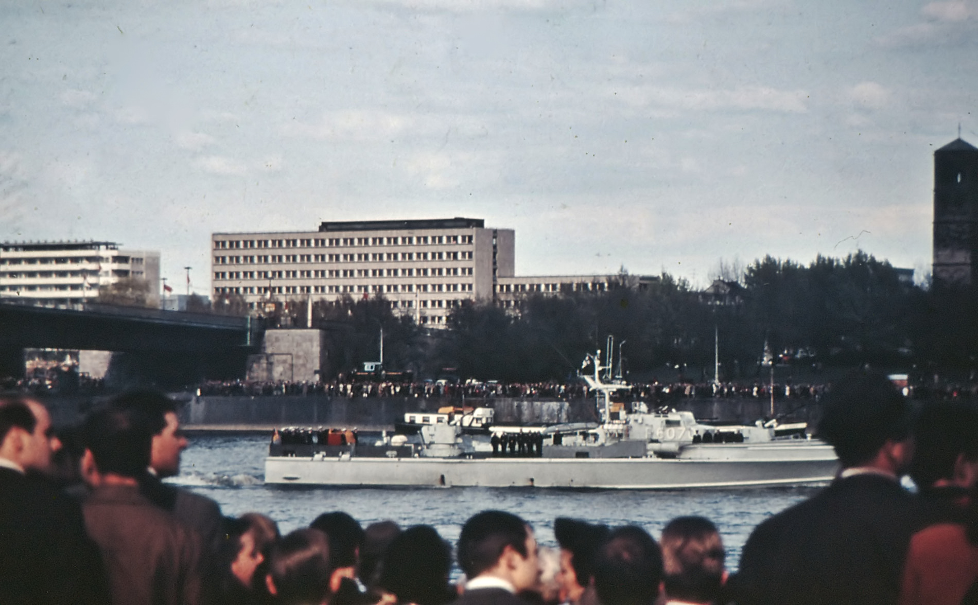 Am 25. April 1967 überführte „Kondor“ begleitet von „Habicht“ und „Sperber“ des 2. Schnellbootgeschwaders den Sarg des verstorbenen Bundeskanzlers Konrad Adenauer vom Staatsakt im Kölner Dom zur Beisetzung nach Bad Honnef-Rhöndorf.